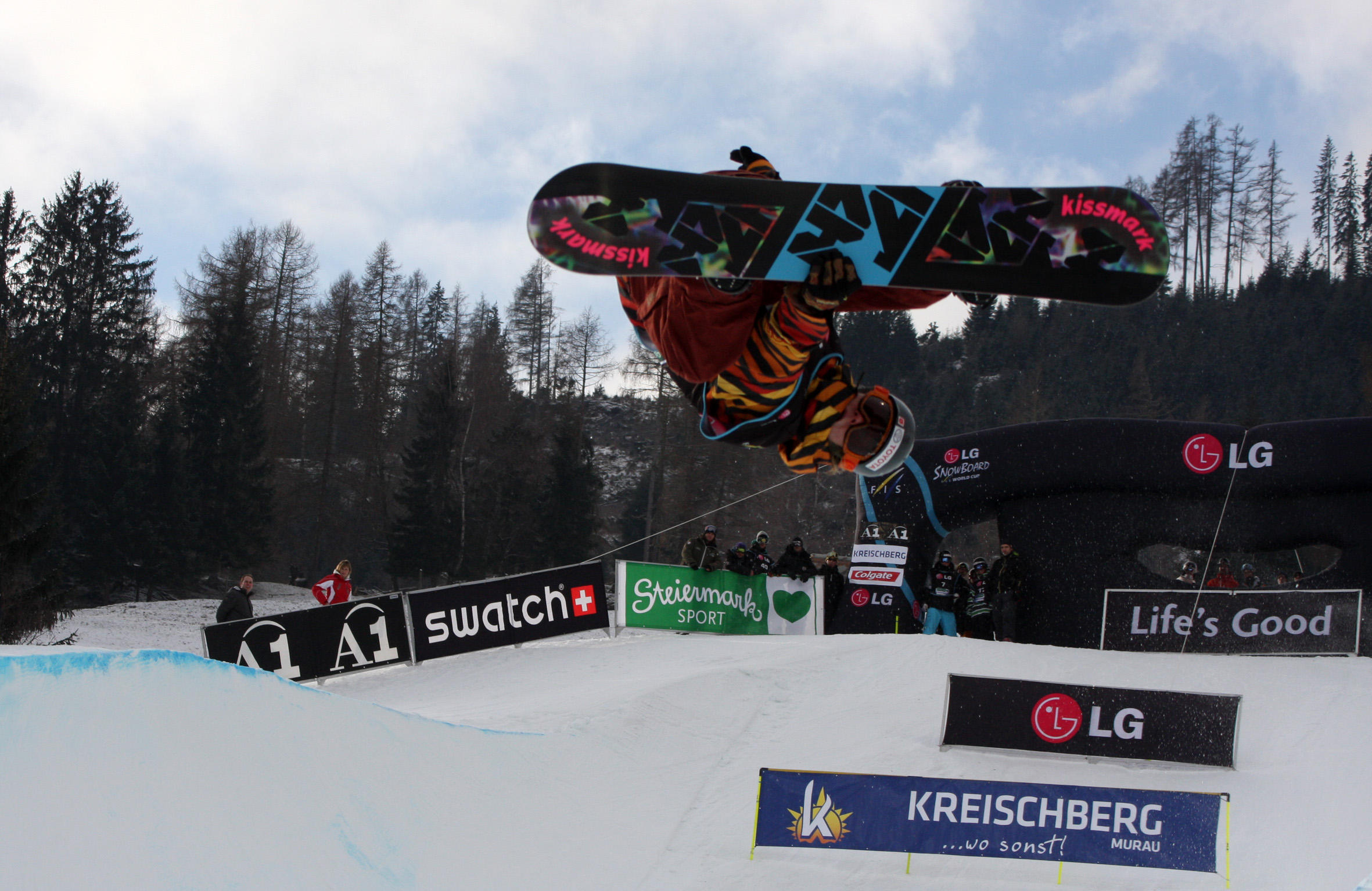 Kreischberg_HP_Ilkka-Eemeli_Laari_FIN